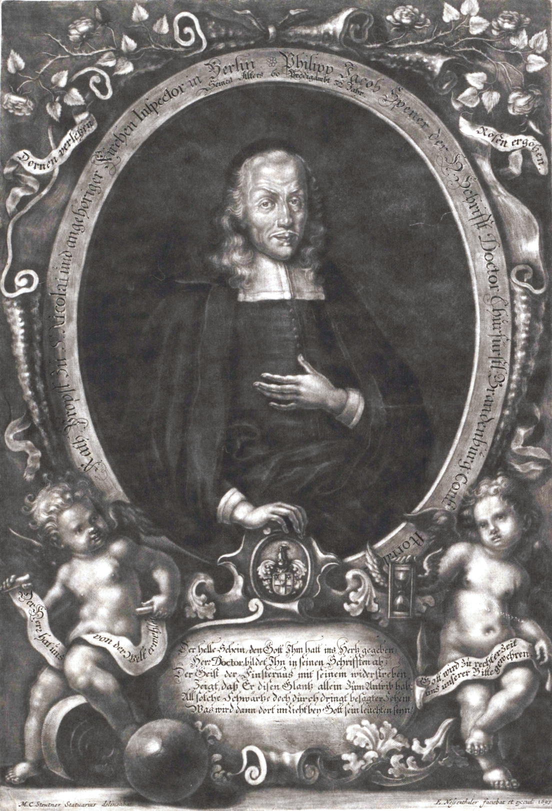 Philipp Jacob Spener (1635–1705) im Alter von 60 Jahren